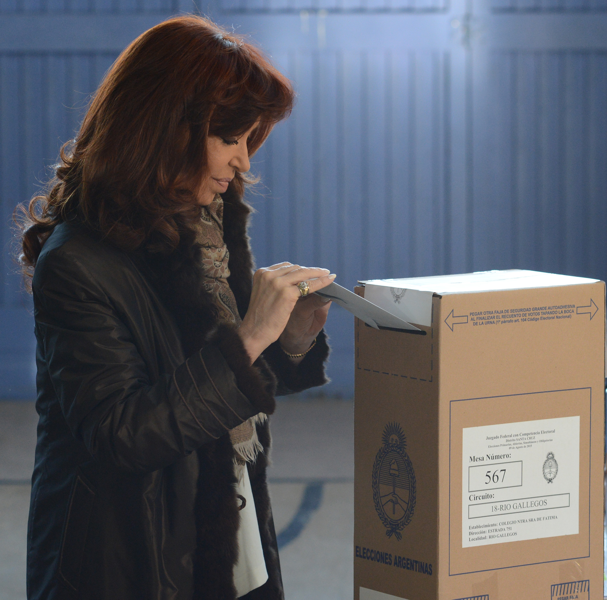 Cristina Fernández de Kirchner votando en las PASO 2015 del 9 de agosto en Río Gallegos, provincia de Santa Cruz, Argentina.